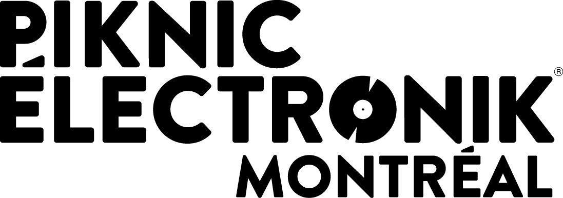 Logo du Piknic Électronik Montréal